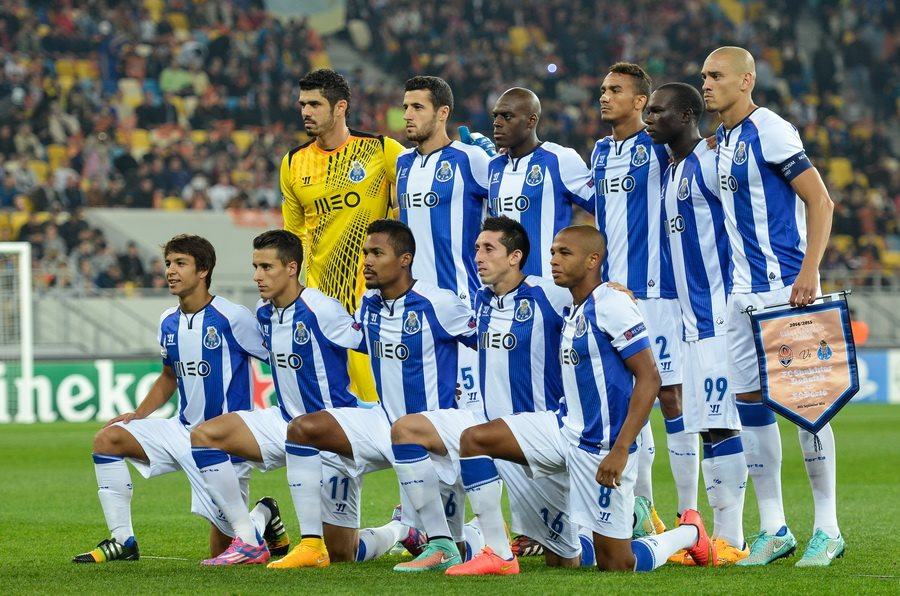 ФК Порту у Лізі чемпіонів